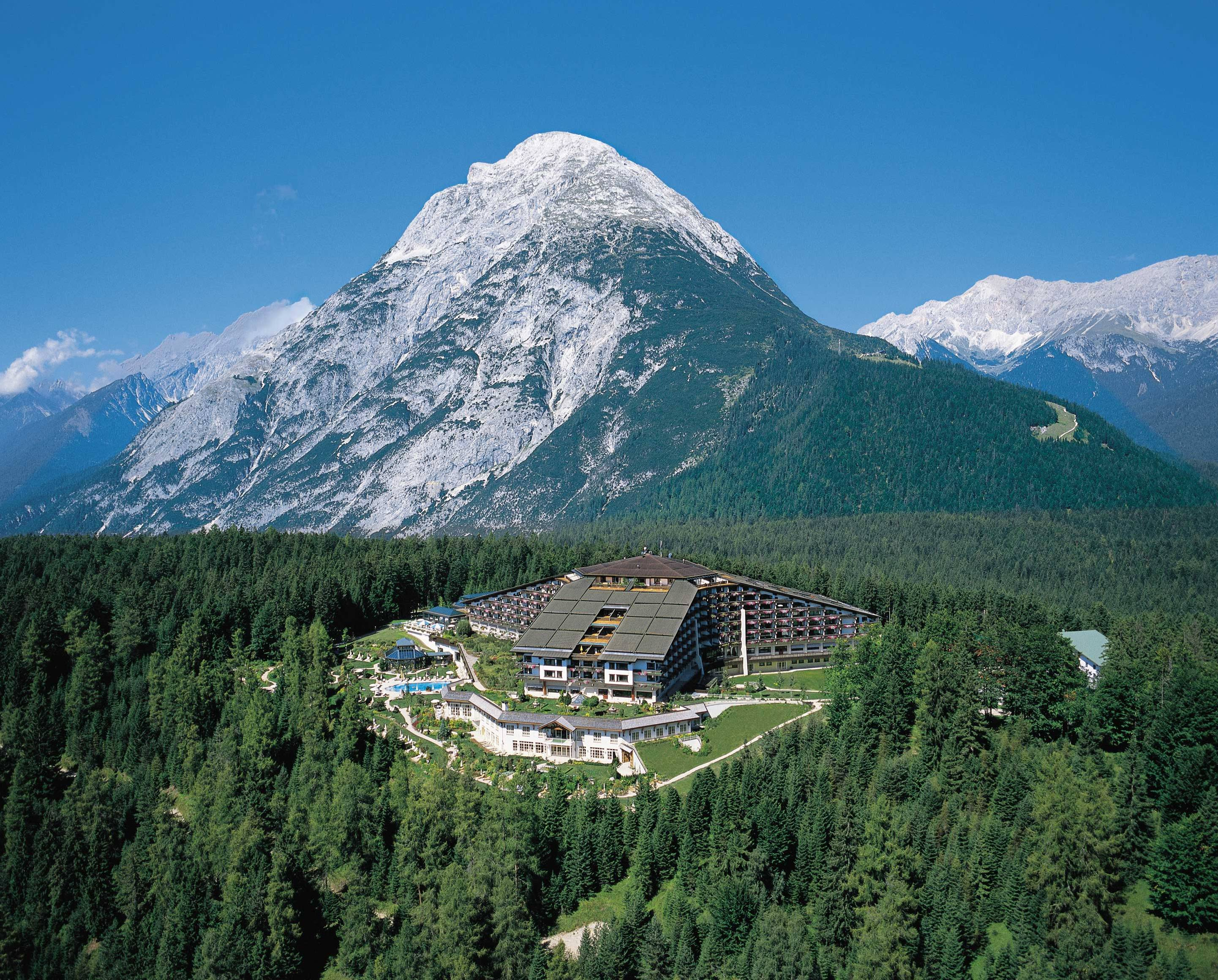 Außenansicht des Interalpen-Hotels Tyrol mit Blick auf die Hohe Munde